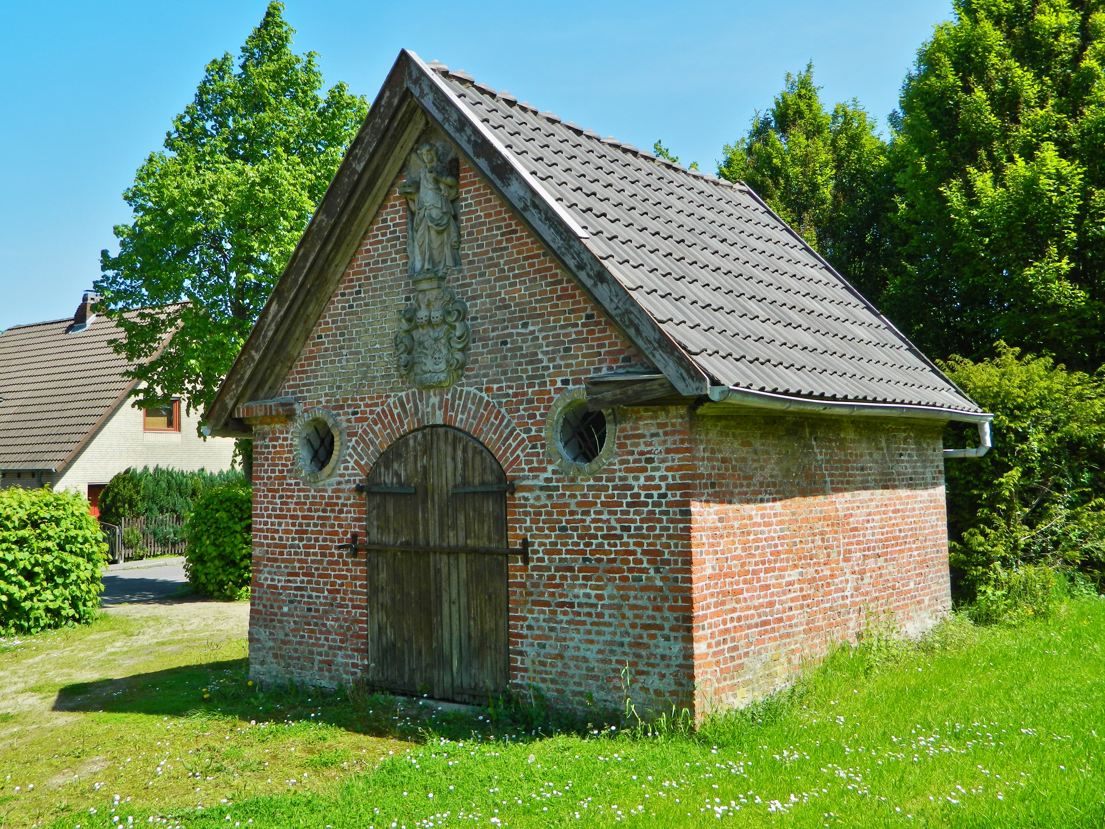 Anno1697